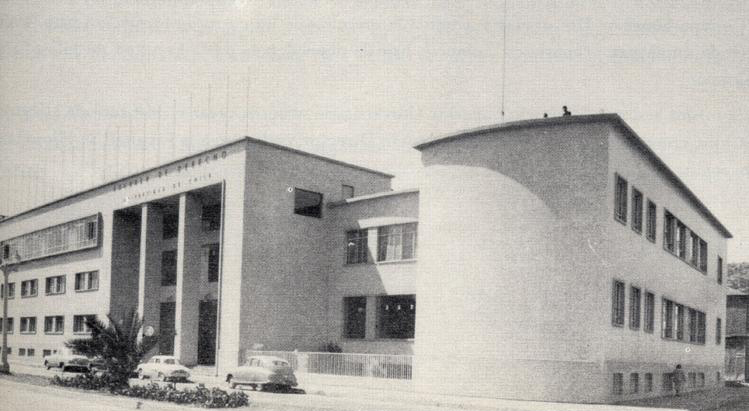 Vista general de la ex Escuela de Derecho de la Universidad de Chile en Valparaíso, 1977